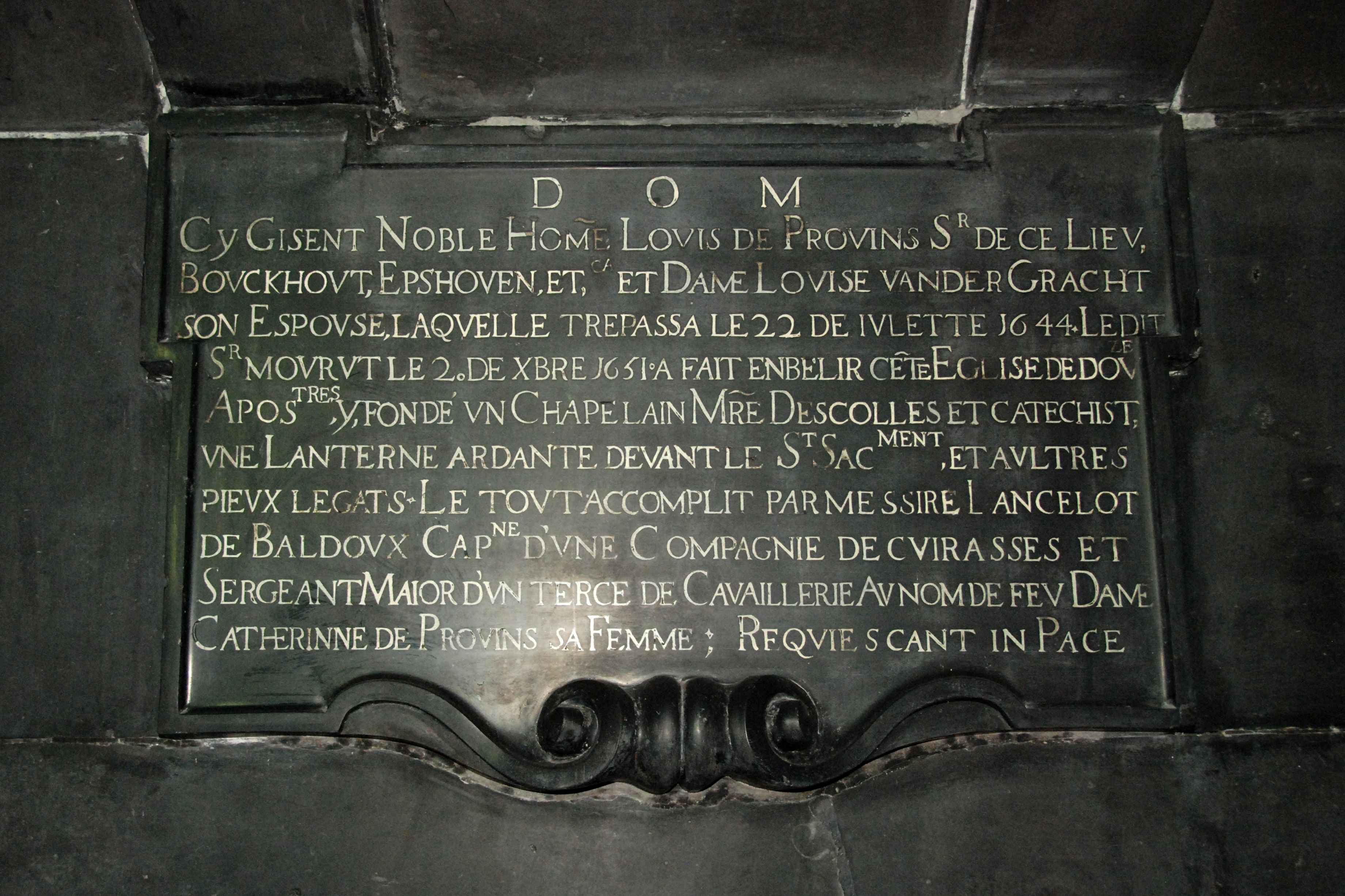 Belgique - Brabant wallon - Église de Court-Saint-Étienne - Enfeu de Louis de Provins